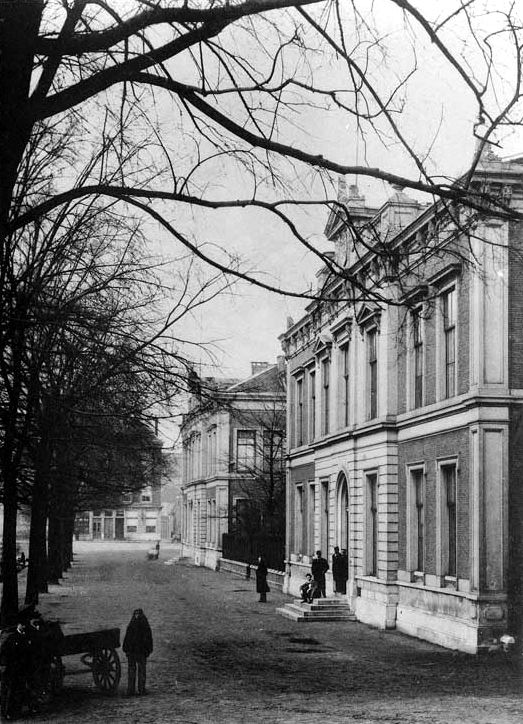 Westvest 9 met op de achtergrond Westvest 7 (tegenwoordig Westvest 5) in Delft, laat 19e eeuw